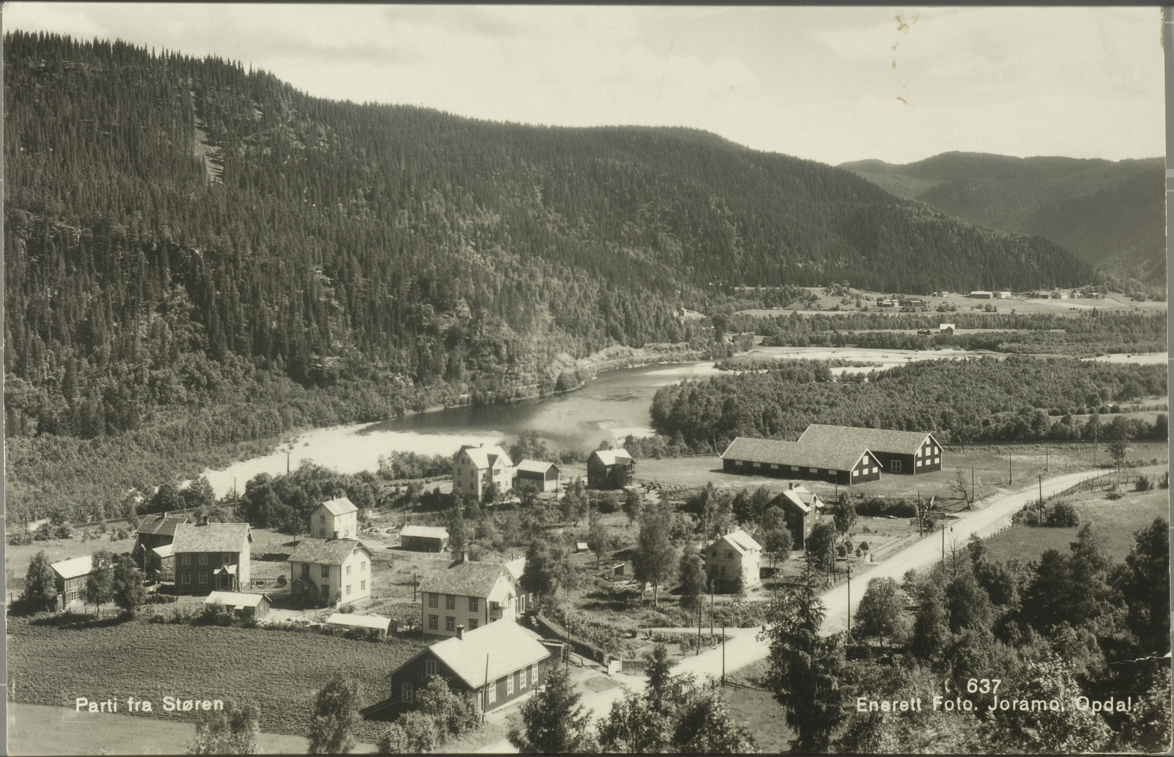 Støren in Midtre Gauldal, Norway